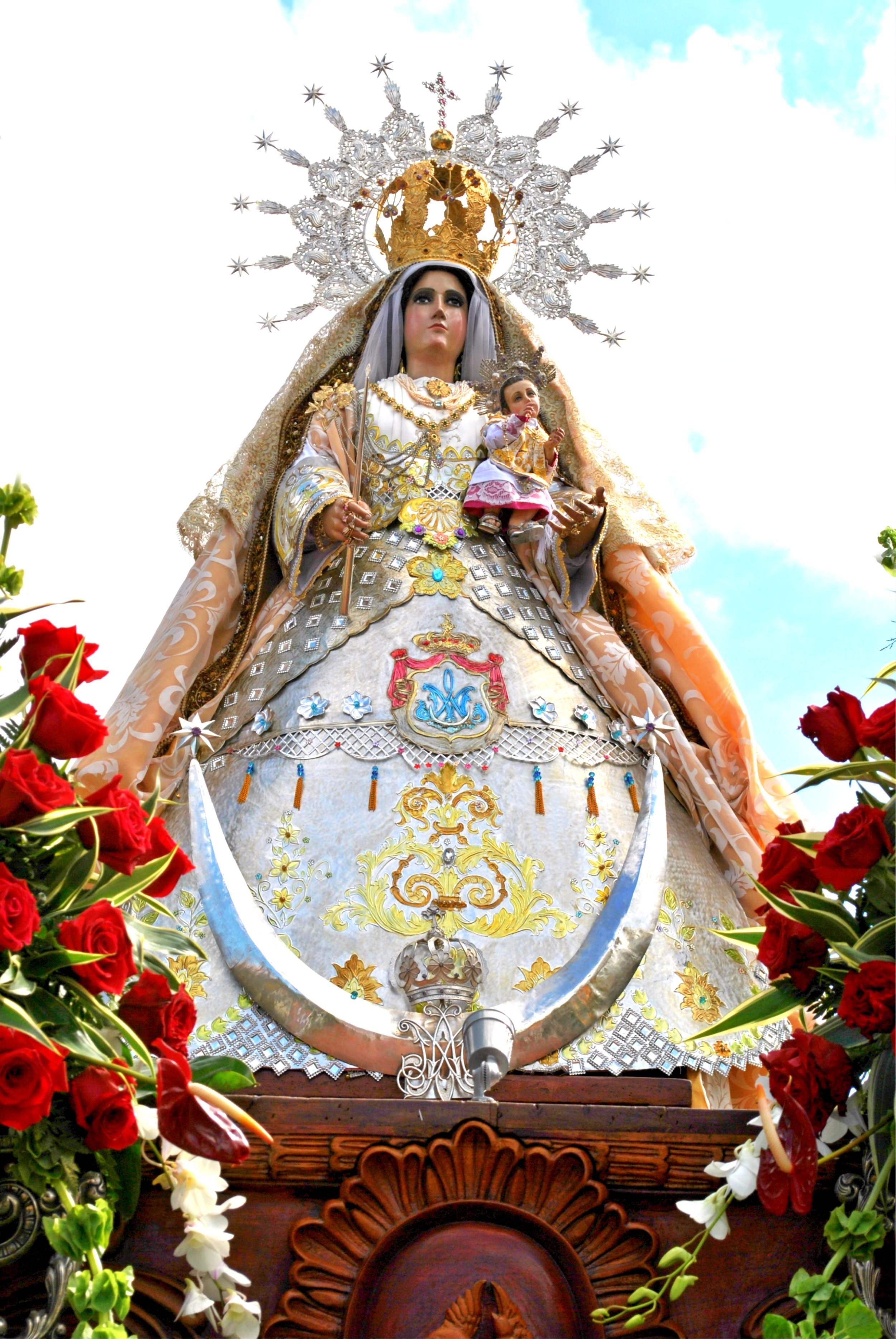 Imagen de Ntra. Sra. de Candelaria, Diriomo, Granada, Nicaragua.